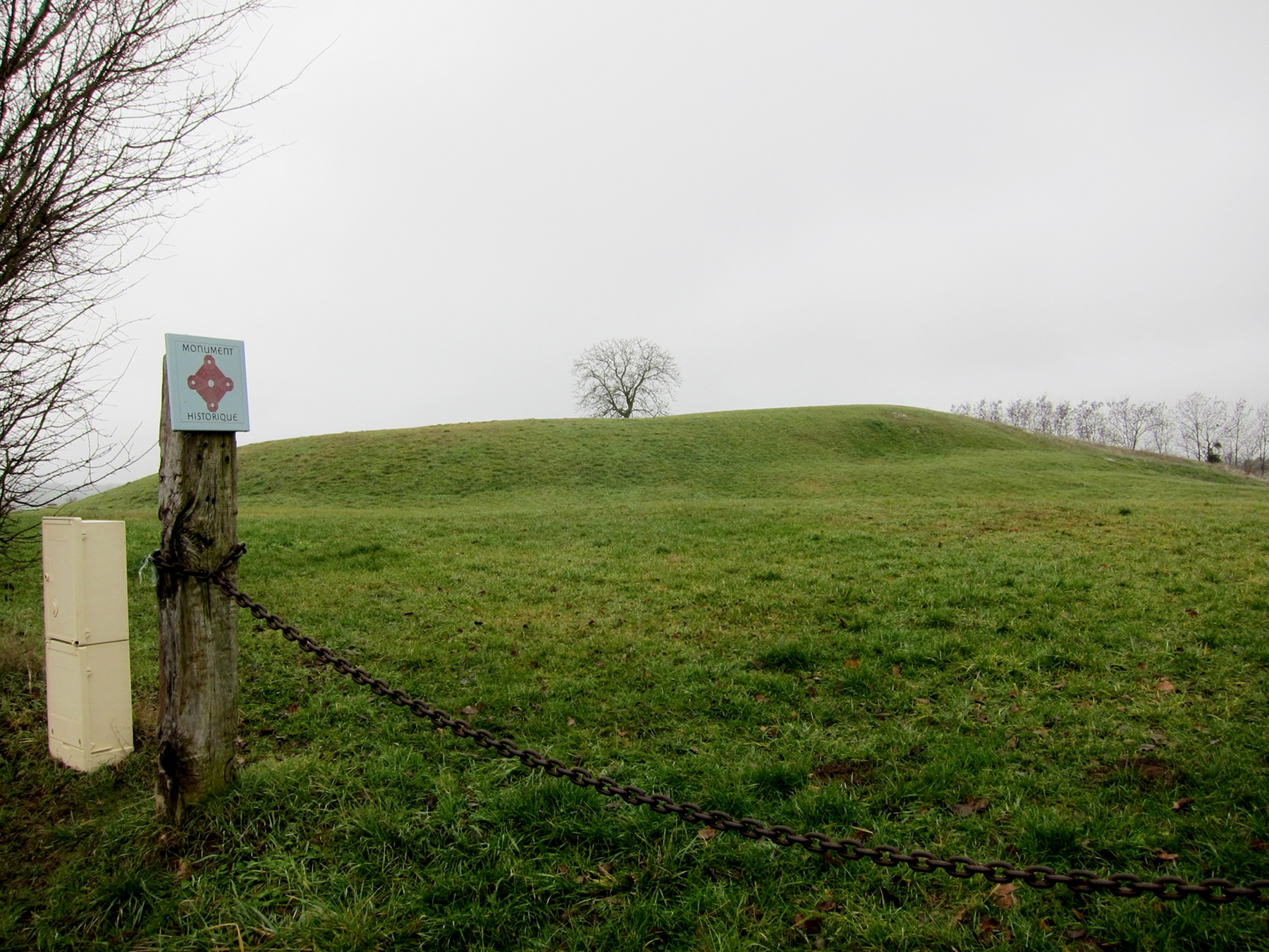 La motte castrale le Chatellier à Rémalard (Orne).